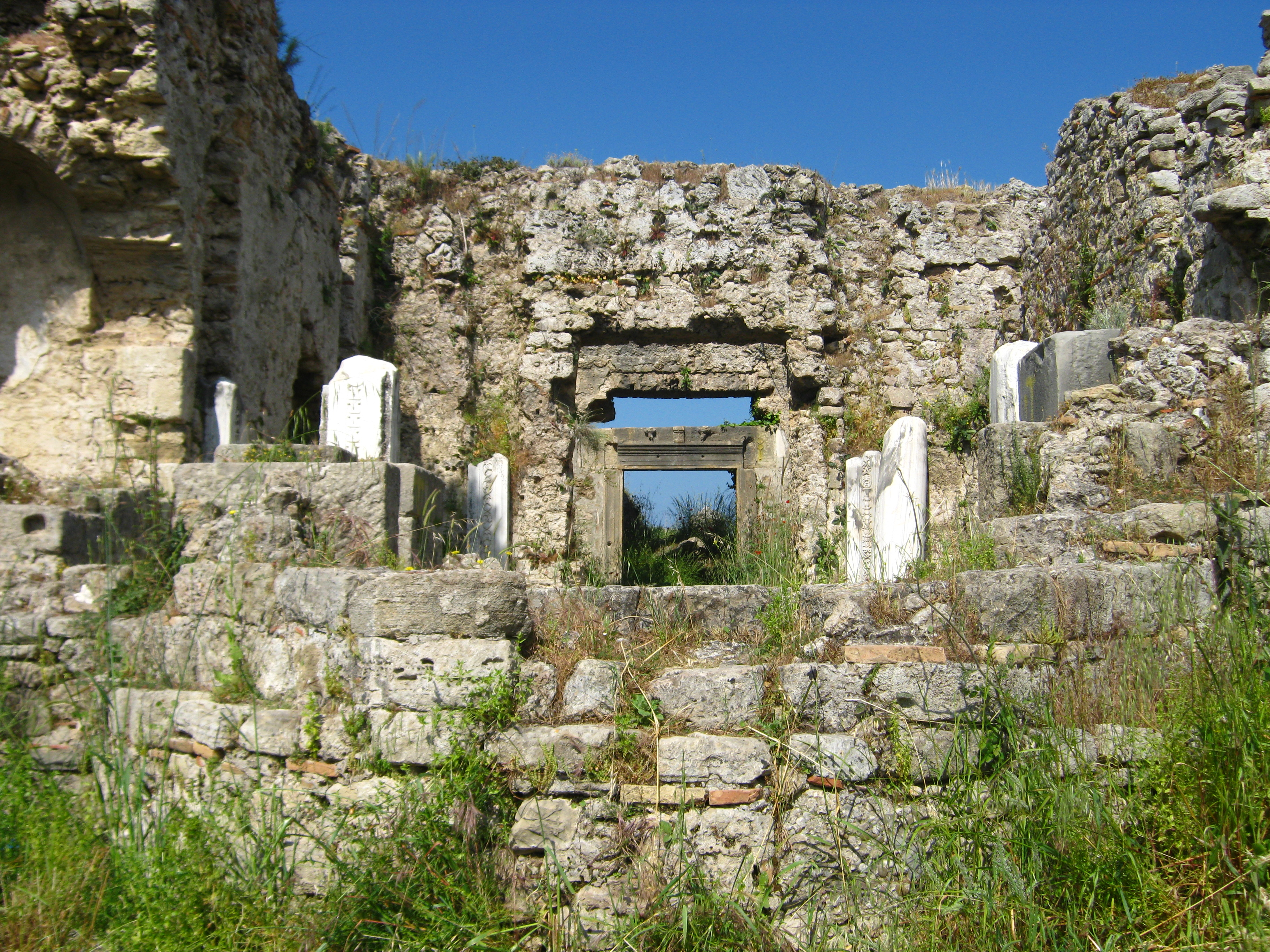 Каплиця "Єпископського палацу"